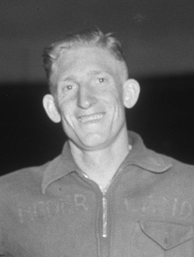 Heimen Lagerwaard in 1953.